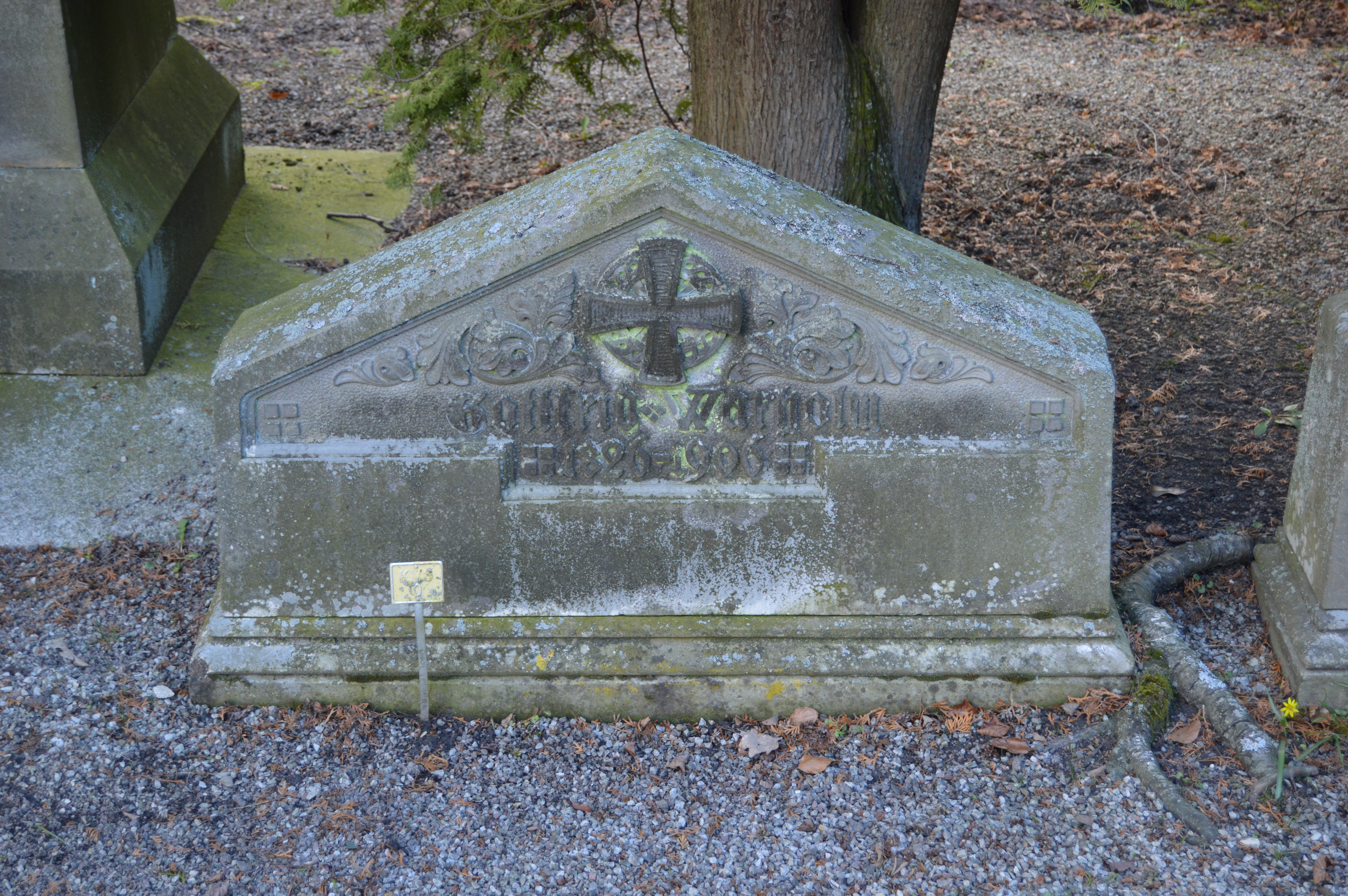 Gottfrid Warholms grav på Östra kyrkogården i Lund.